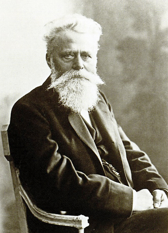 Директор Санкт-Петербургского Металлического завода О. Е. Крель. Конец 19 - начало 20 века. Музей Ленинградского Металлического завода. КРЕЛЬ (Krell) Оттон Георгиевич (Отто Георг) (1893, Саксен-Мейнинген - 1913, Германия), инженер. Окончил реальную гимназию в Зальфельде. В России с 1860. Помощник главного инженера в Петербургском Обществе столичного освещения. По проекту К. проведено газовое освещение Васильевского-острова. В 1864-65 построил в С.-Петербурге самый большой в Европе газгольдер. Директор Петербургского металлического завода (1867-91). В 1882 на Всероссийской художественной выставке в Москве завод удостоен разрешения ставить на своих изделиях Государственный герб, а «саксен-мейнингенский подданный» К. «за полезную деятельность на поприще отечественной промышленности» награжден орденом Св. Анны 2-й ст. В 1883-92 разработал железные конструкции для трех корпусов Сенного рынка (С.-Петербург). В 1888 удостоен почетного звания инженера-технолога. Член Совета торговли и мануфактуры Министерства финансов России. В кон. 1890-х гг. покинул Россию и поселился в собственном доме в Нюрнберге. Был женат (1865) на Хелене Фляйшман (Fleisch-mann) из Нюрнберга. Имел двоих сыновей: Рудольф Георг Отто К. (1866 - ?) и Рудольф К. (1868- ?)